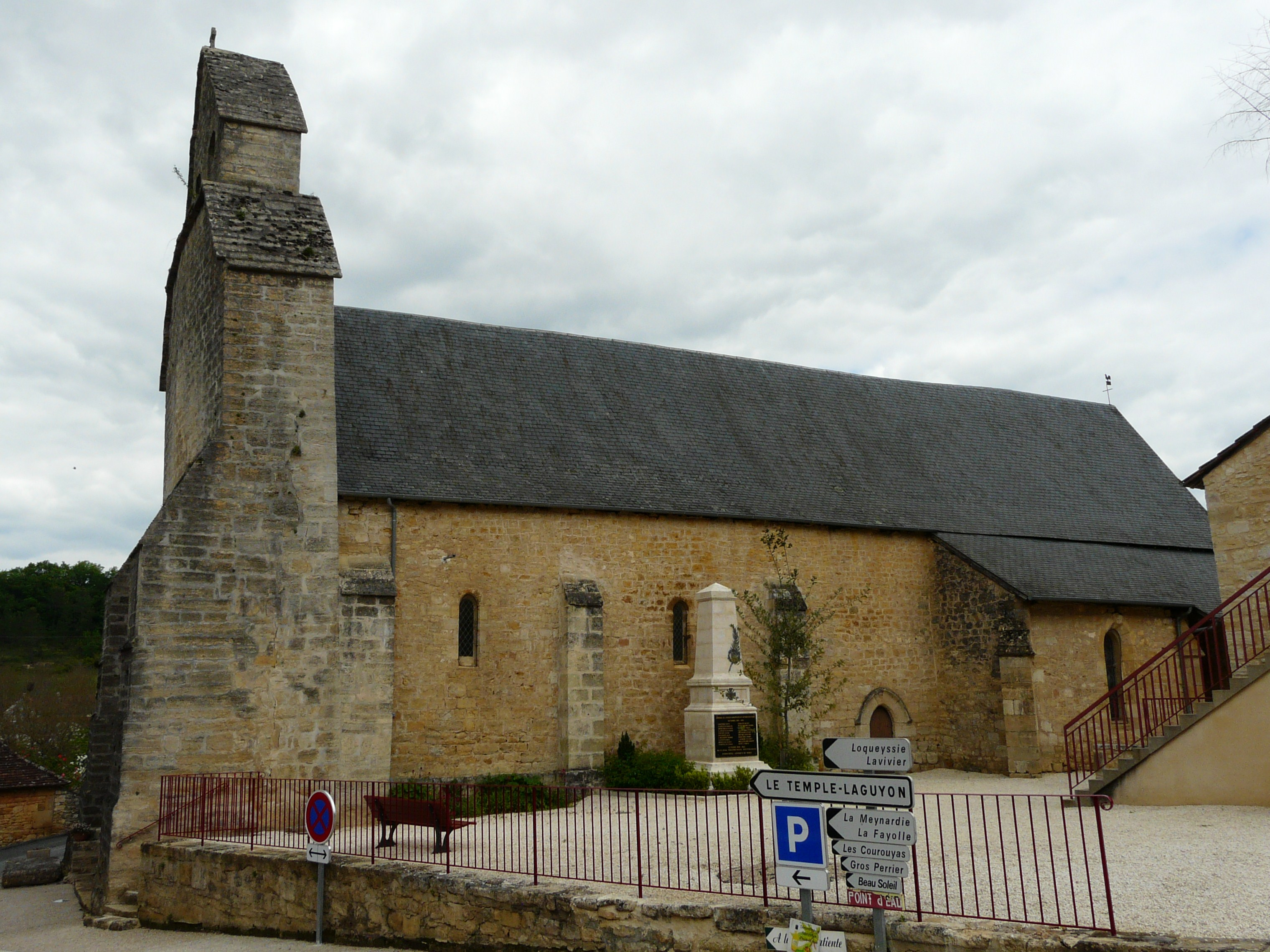 L'église de Granges-d'Ans, Dordogne, France.